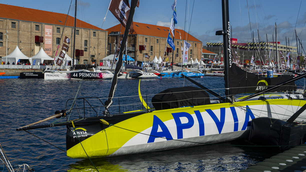 Apivia à quai au Havre durant la Transat Jacques Vabre 2019